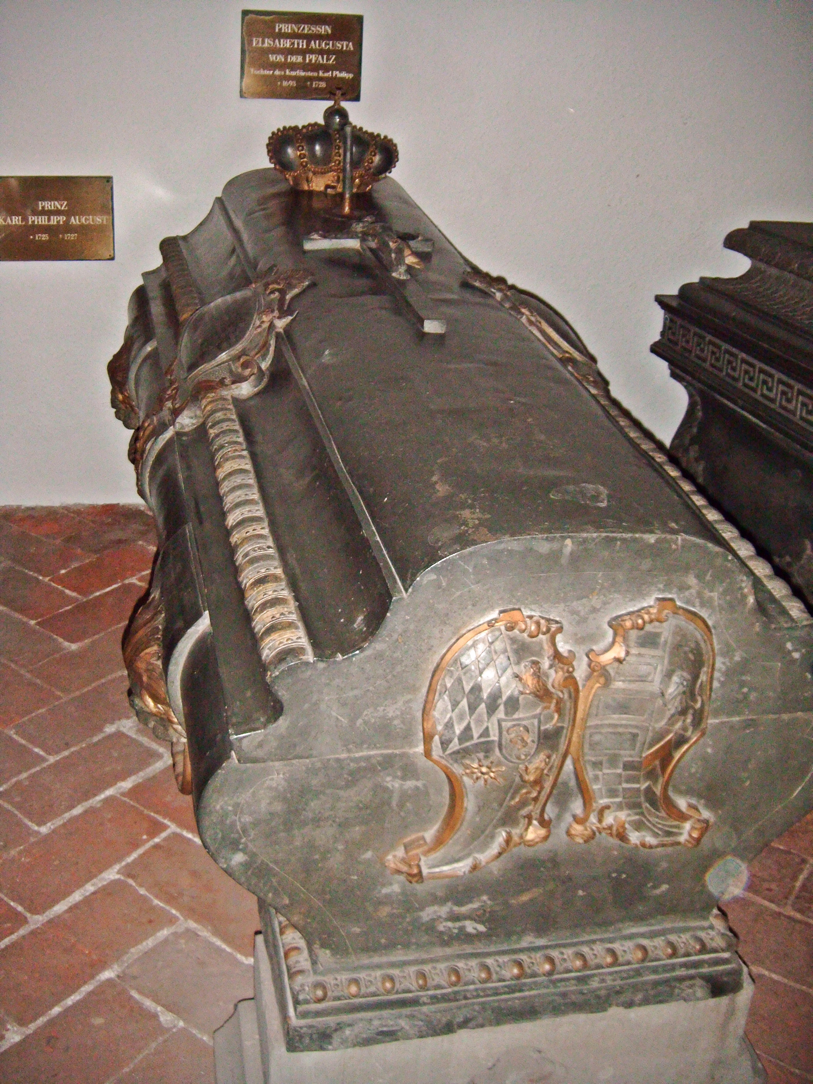 Prinzessin Elisabeth Auguste Sophie von der Pfalz (1693-1728), Tochter des Kurfürsten Karl III. Philipp von der Pfalz, Großmutter des Bayerischen Königs Max I. Joseph. Sarkophag in der St. Michaelskirche München.